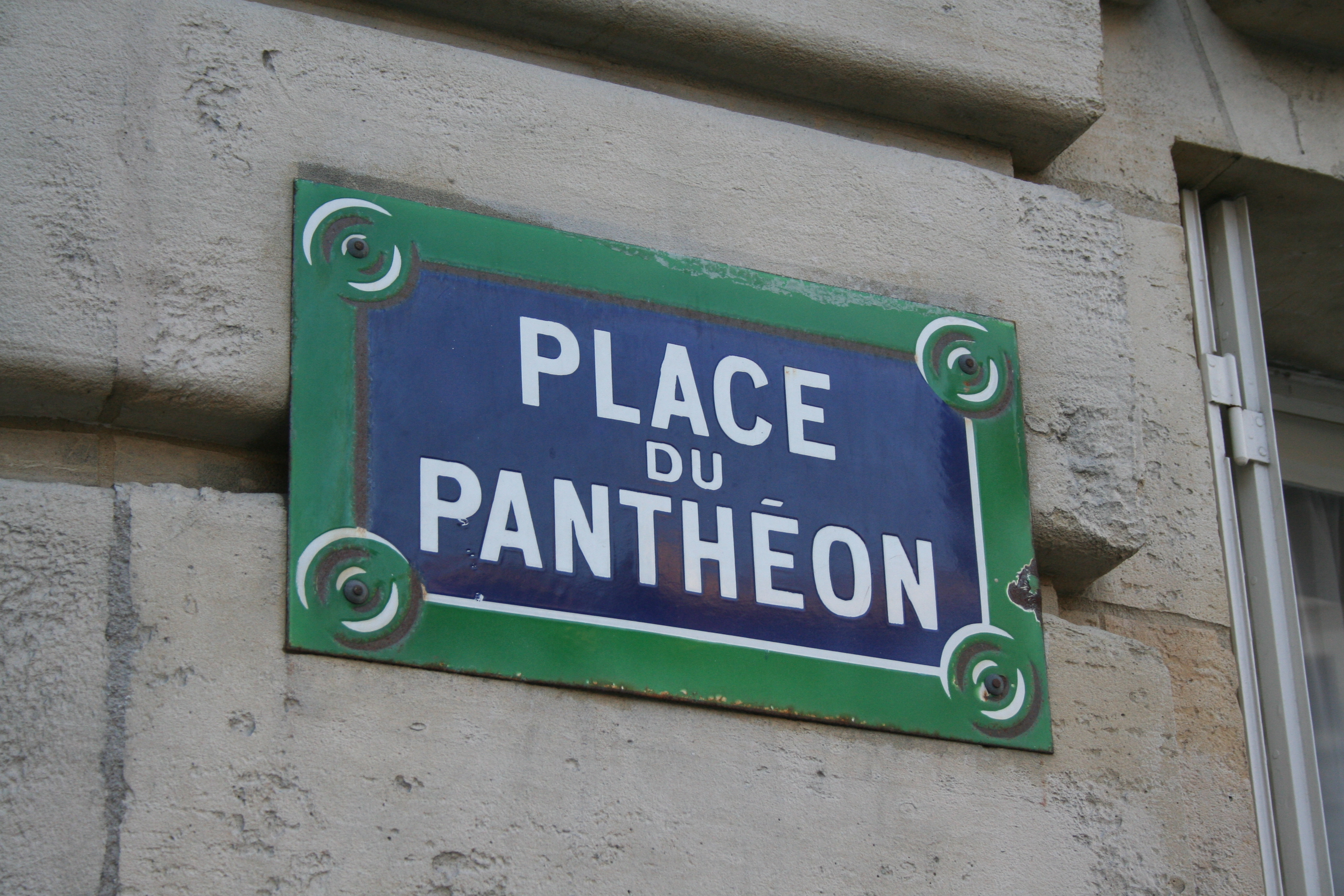 place du panthéon